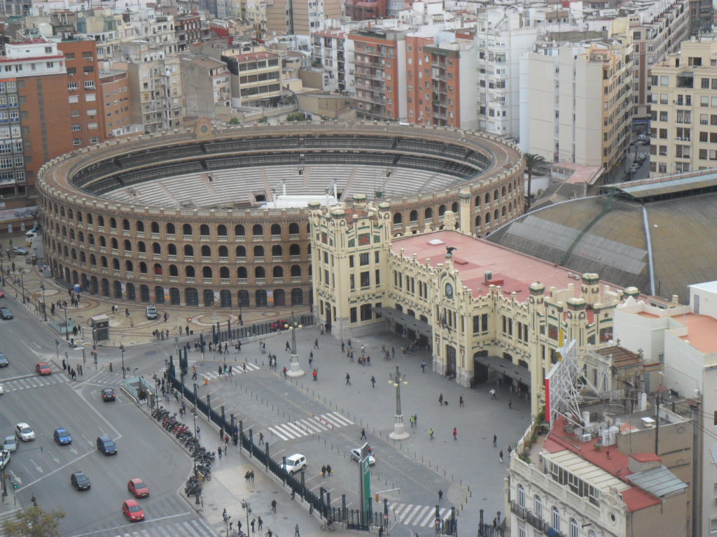 La plaza de toros y la estacion del norte en valencia